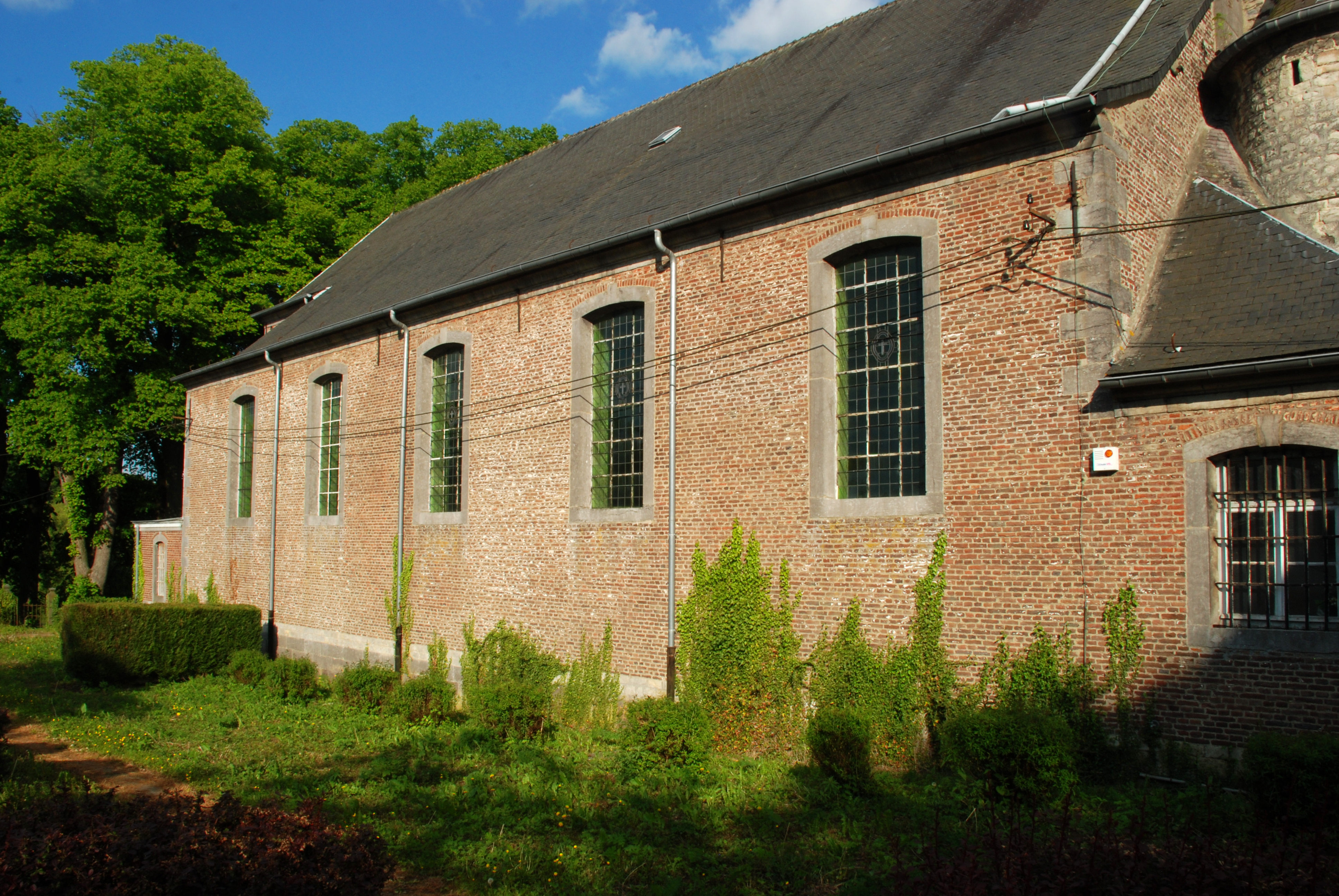 Belgique - Brabant wallon - Église de Court-Saint-Étienne